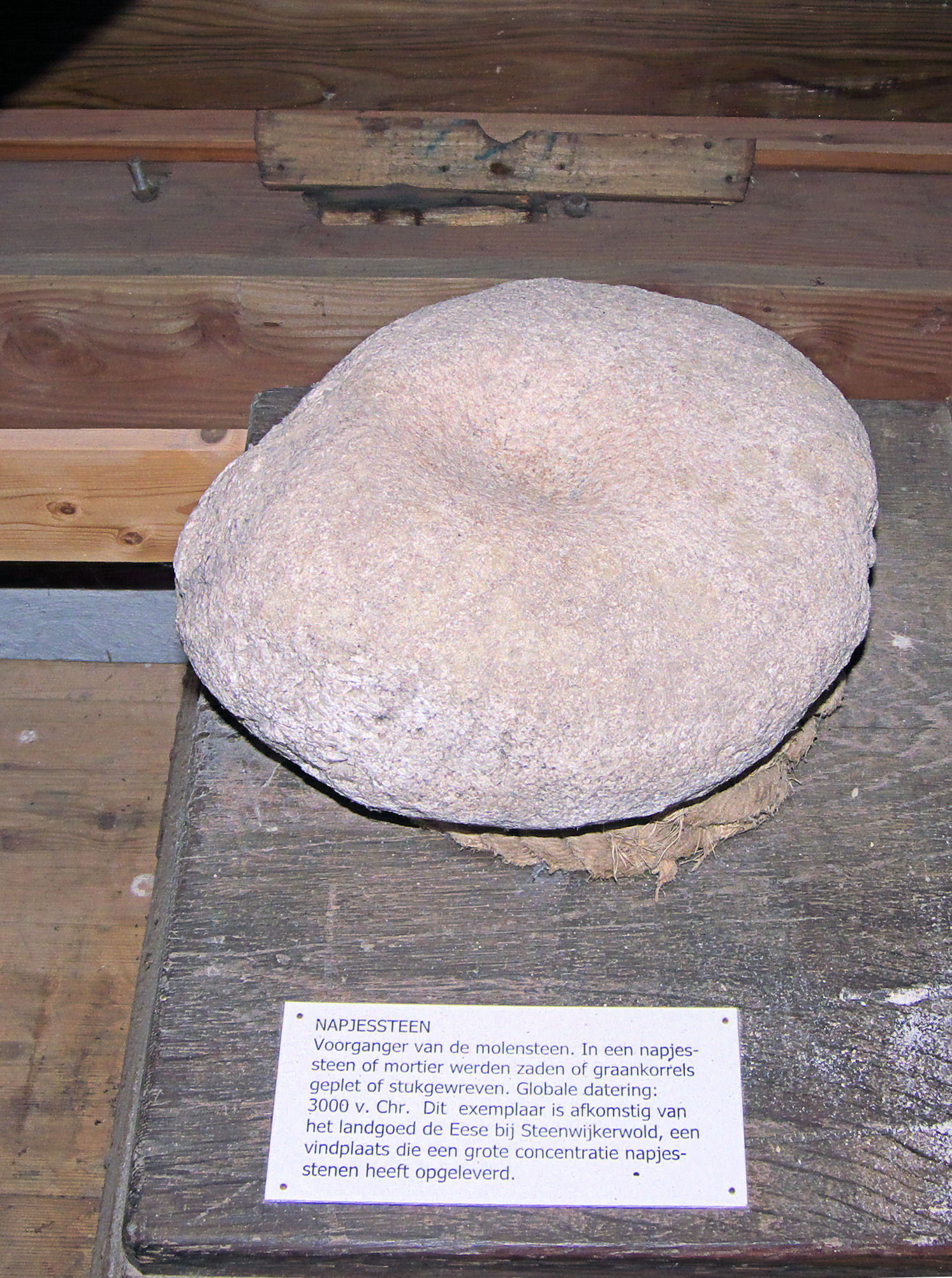 Molen De Traanroeier, Texel, napjesteen uit ongeveer 3000 v. Chr.